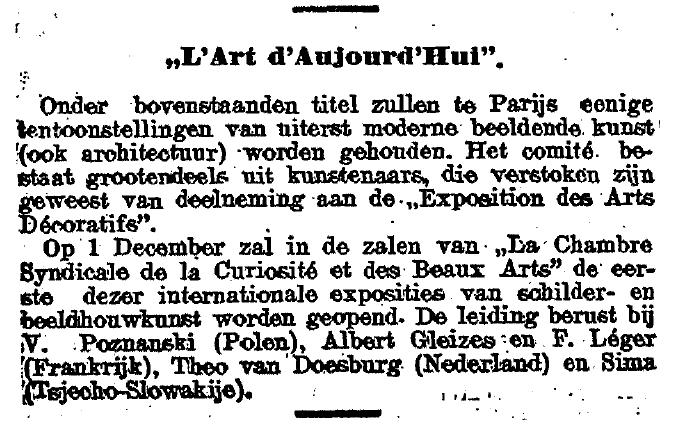 Afomstig uit Nieuwe Rotterdamsche Courant, 24 november 1925, ochtendblad.